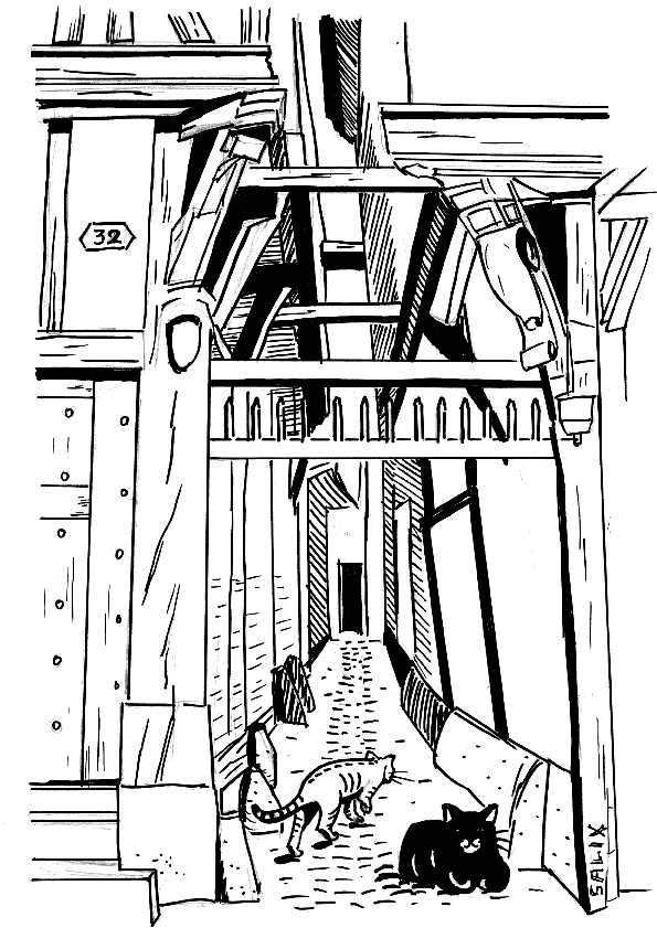 La ruelle des chats, à Troyes, Aube, France. Vue d'artiste, crayon feutre noir, d'après un dessin personnel par Salix.